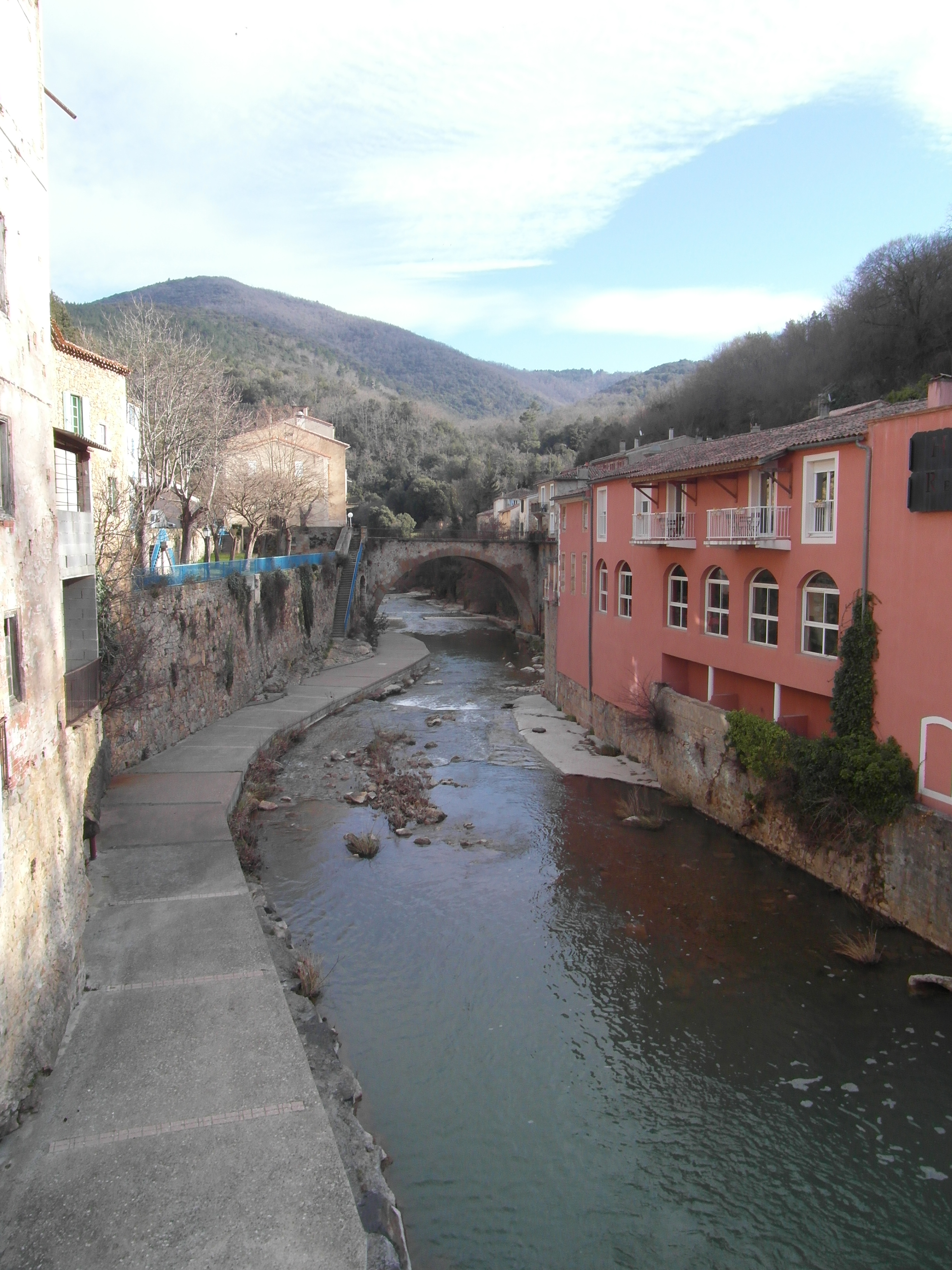 La rivière Sals traversant le village de Rennes-les-Bains